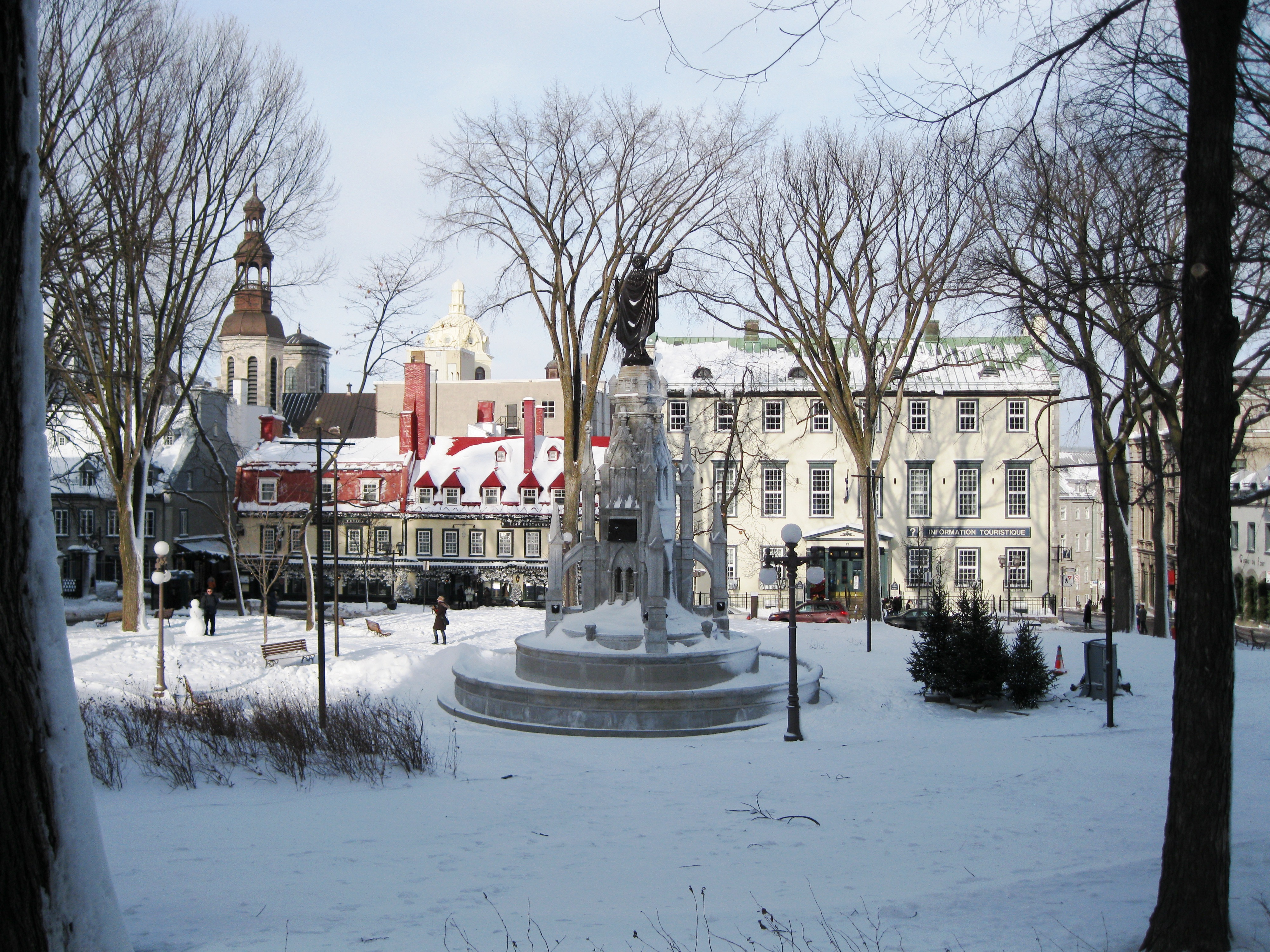 Place d'Armes dans le Vieux-Québec. Au centre, le monument à la Foi. Derrière, des édifices de la rue Sainte-Anne.